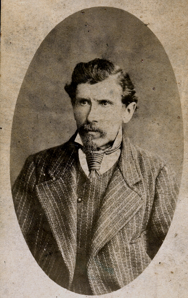 Angelo Stefani ca. 1870 scattata da Floriani Pietro di Riva